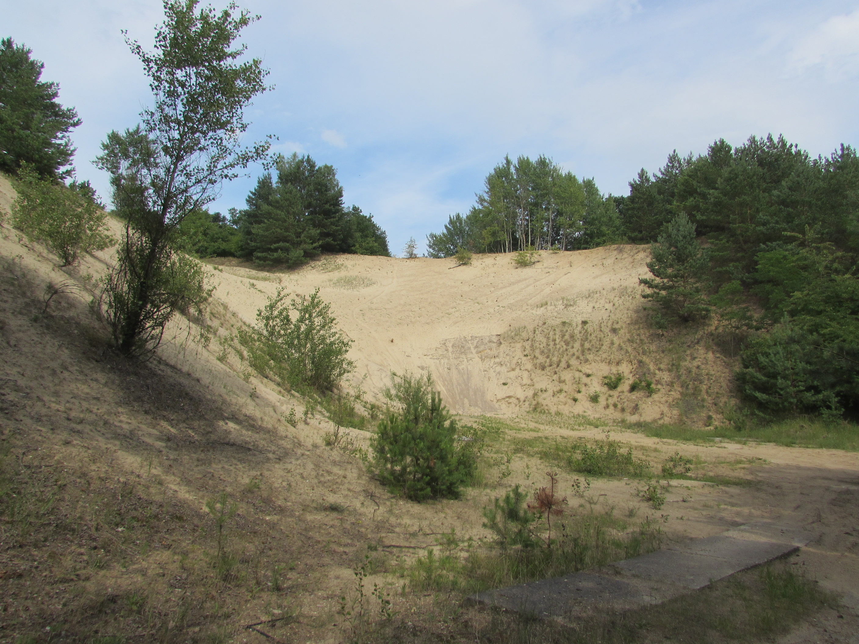 tagebau vehlensche berge